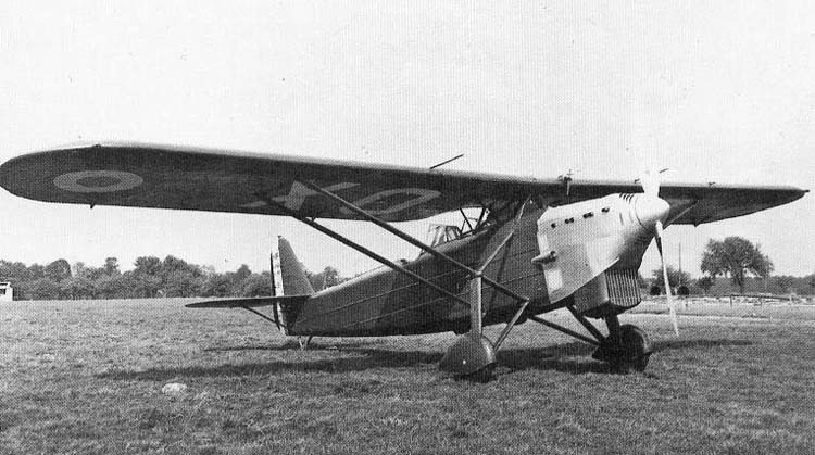 Mureaux 113 de l'armée de l'air française en 1931